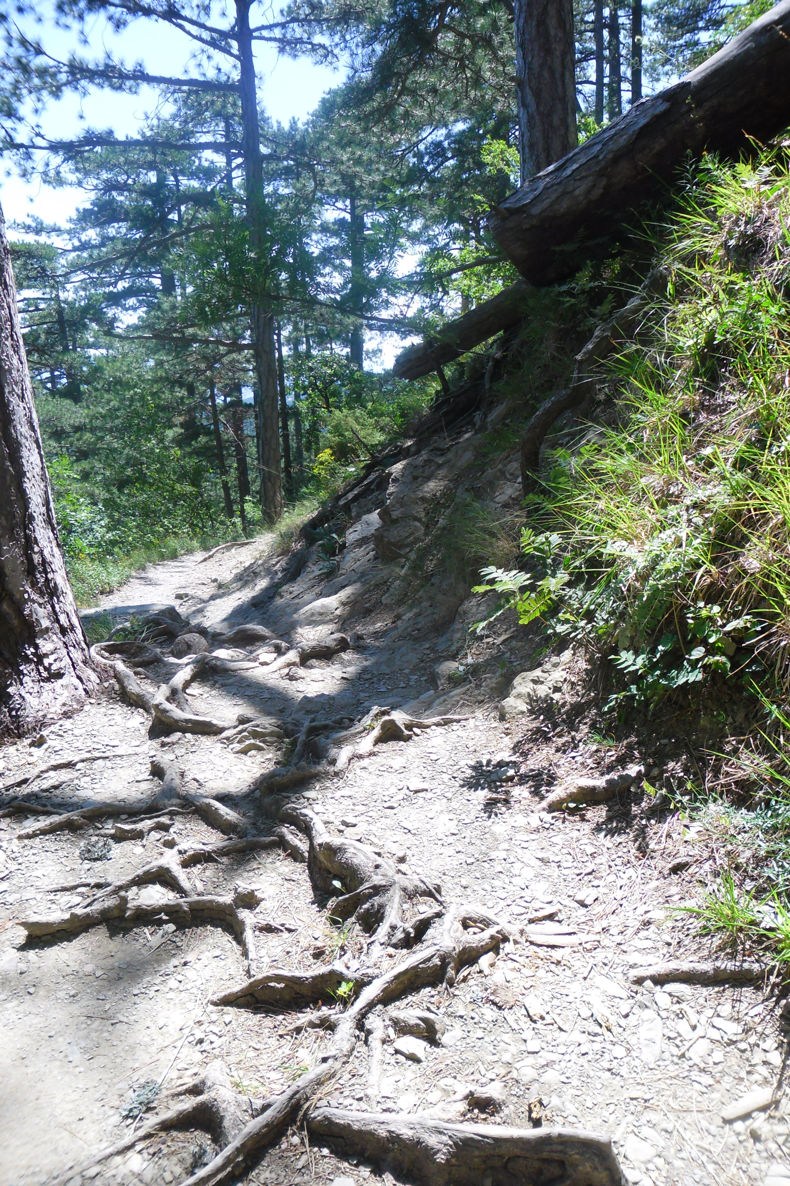 Фото